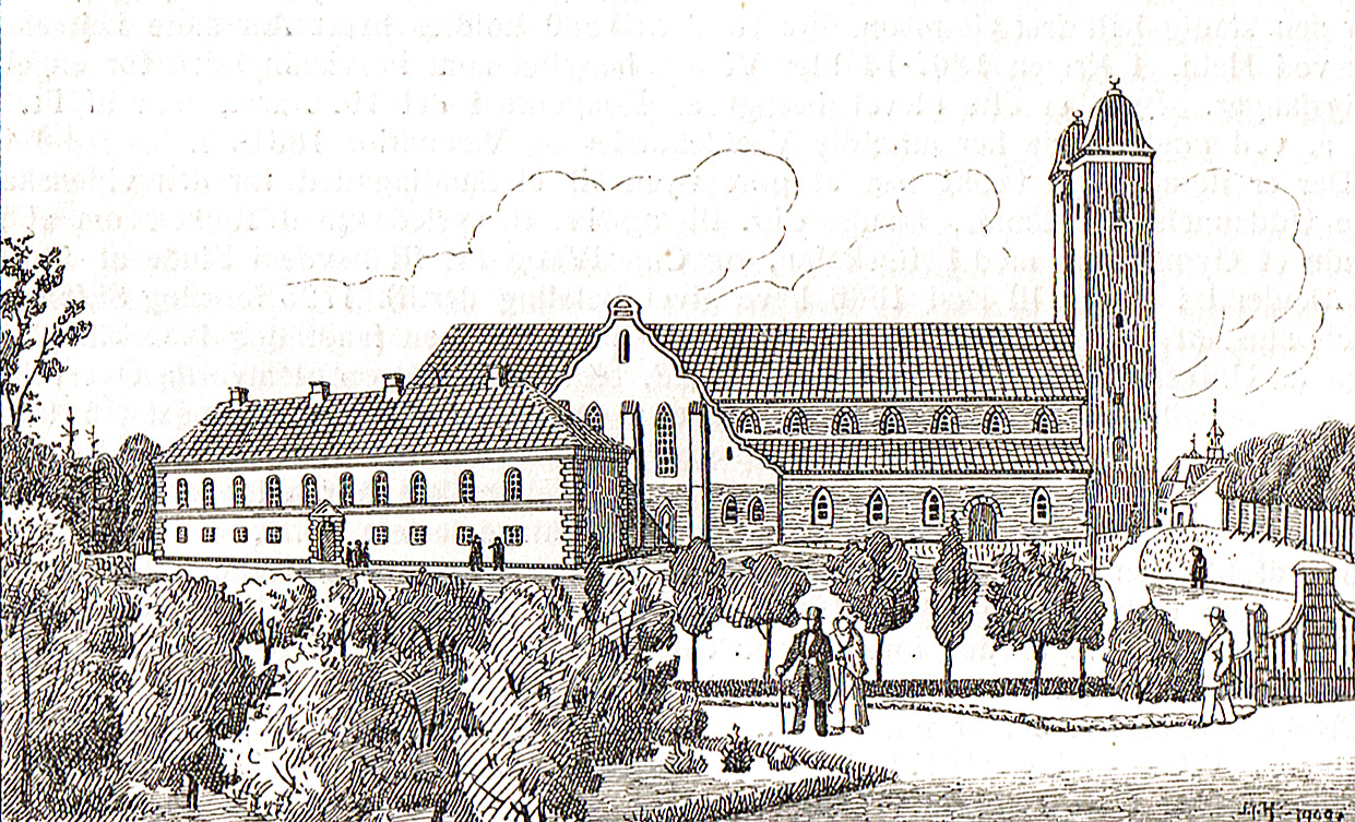 Viborg Domkirke før ombygningen i 1876